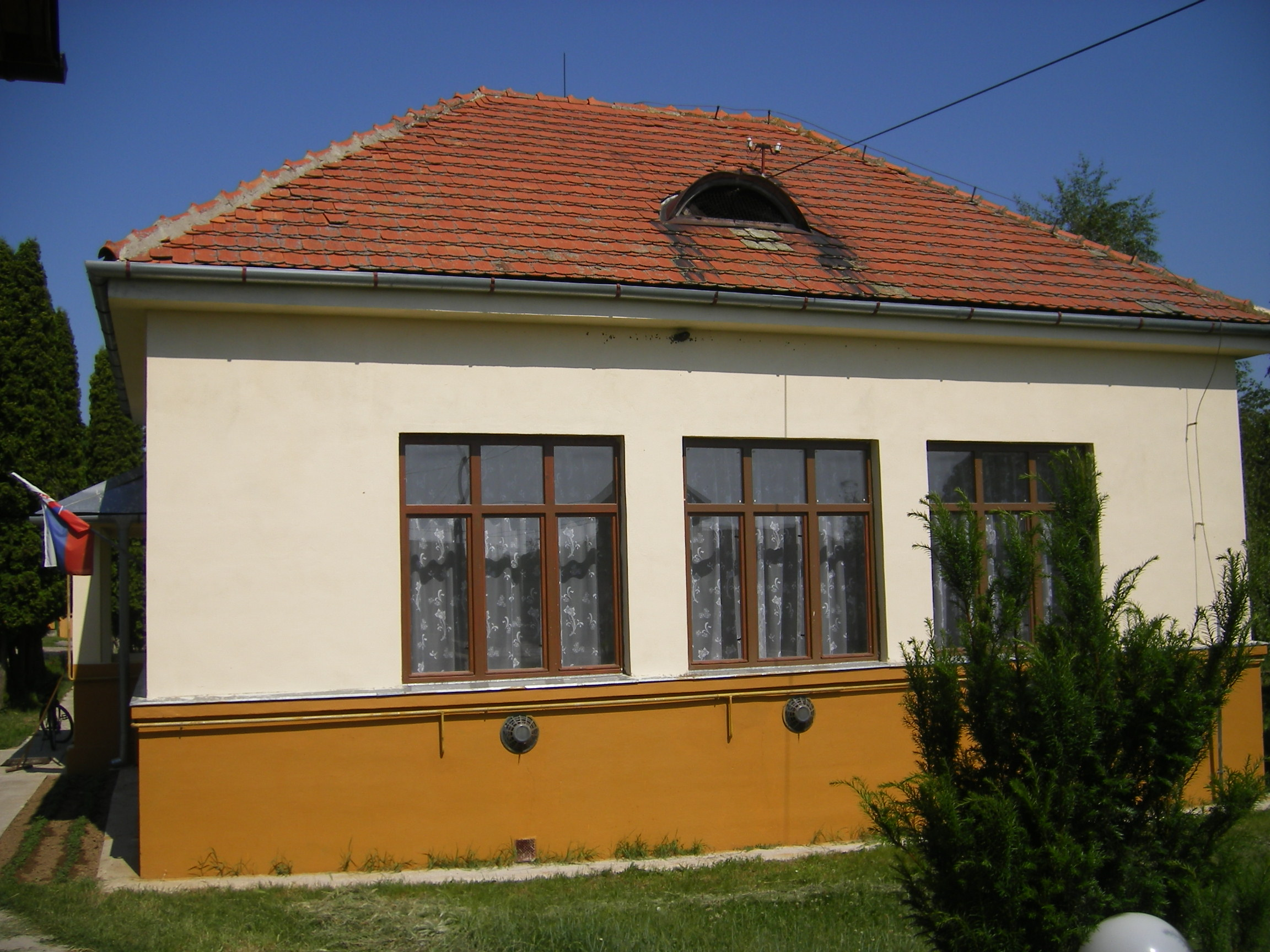 Újpuszta - községháza